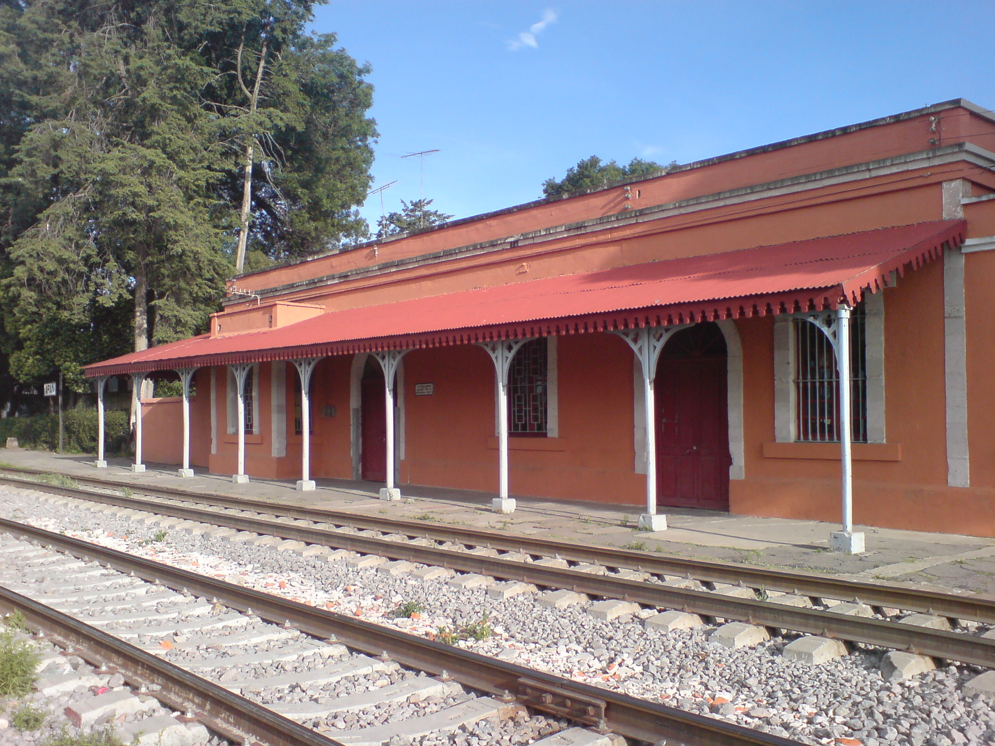 Estación del tren en Apan,Hgo.